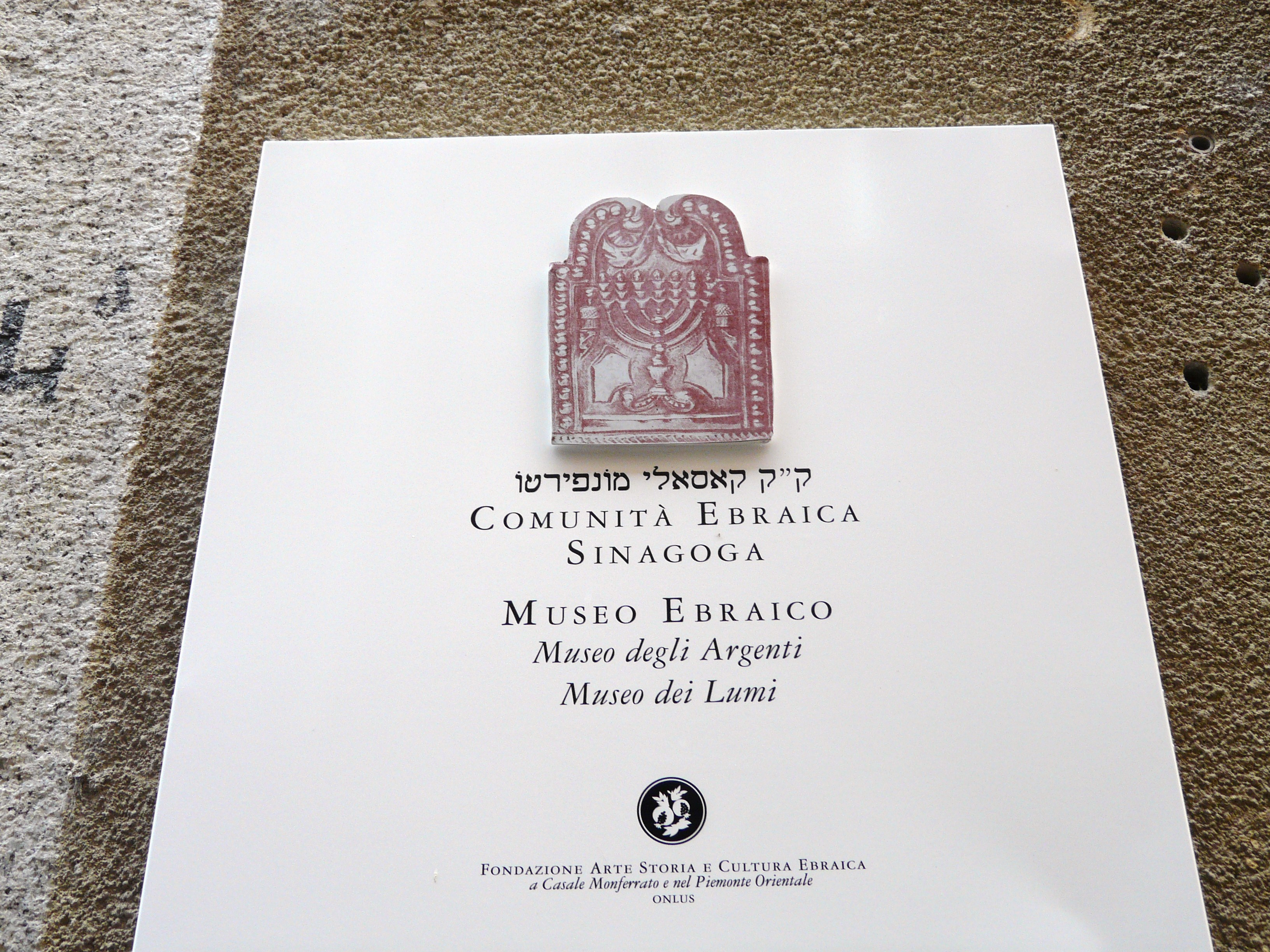 Targa della sinagoga di Casale Monferrato, Piemonte, Italia